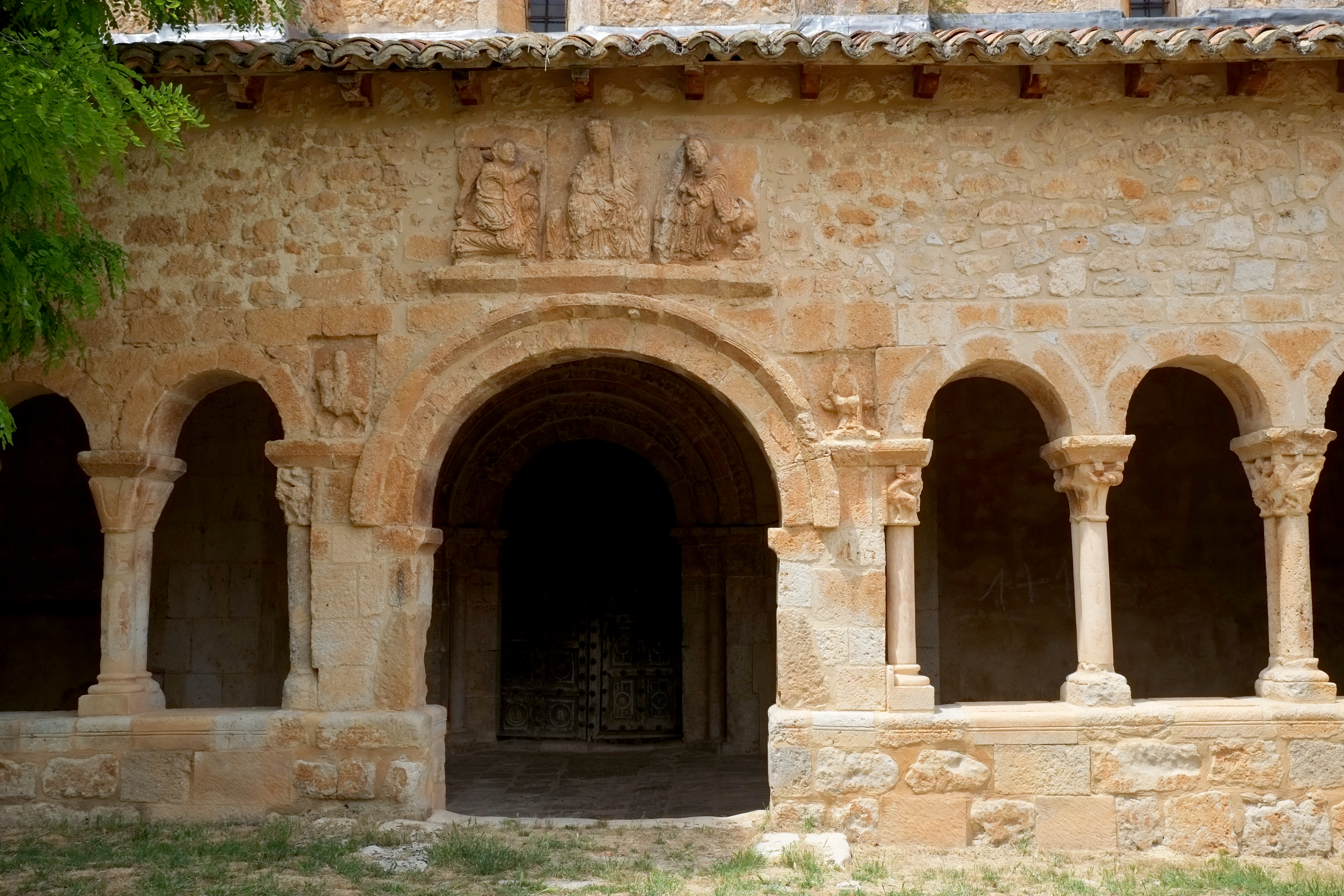 Kirche Nuestra Señora de la Asunción in Villasayas in der Provinz Soria in Kastlien-León (Spanien)